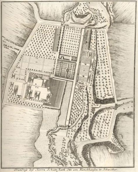 Grundriss der Schloss- und Gartenanlagen in Schwöbber. Aus: „Nürnberger Hesperiden“, Johann Christoph Volkamer, 1714